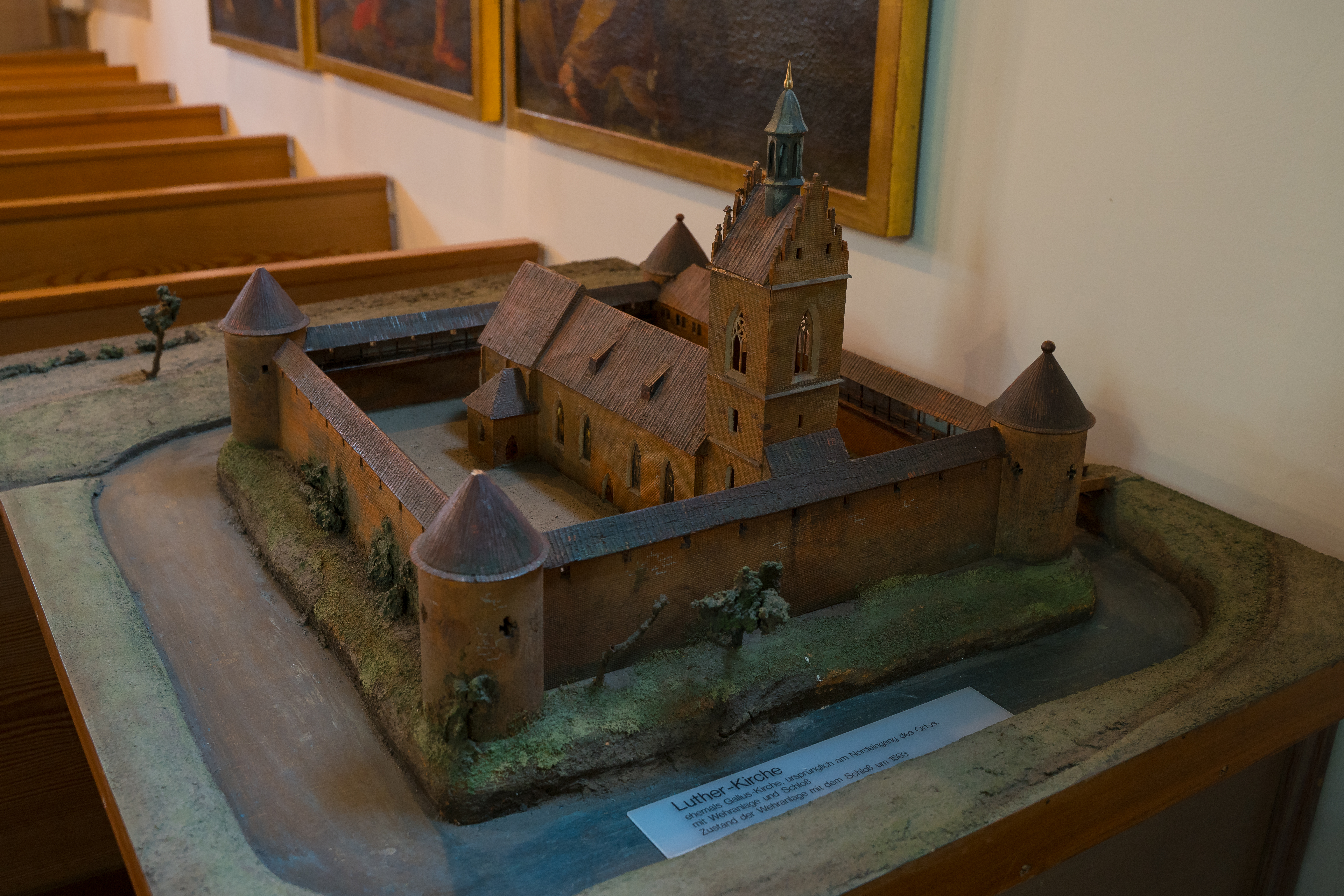 Modell der Lutherkirche in Fellbach um 1593. "Luther-Kirche ehemals Gallus-Kirche, ursprünglich am Nordeingang des Ortes, mit Wehranlage und Schloß Zustand der Wehranlage mit dem Schloß um 1593"